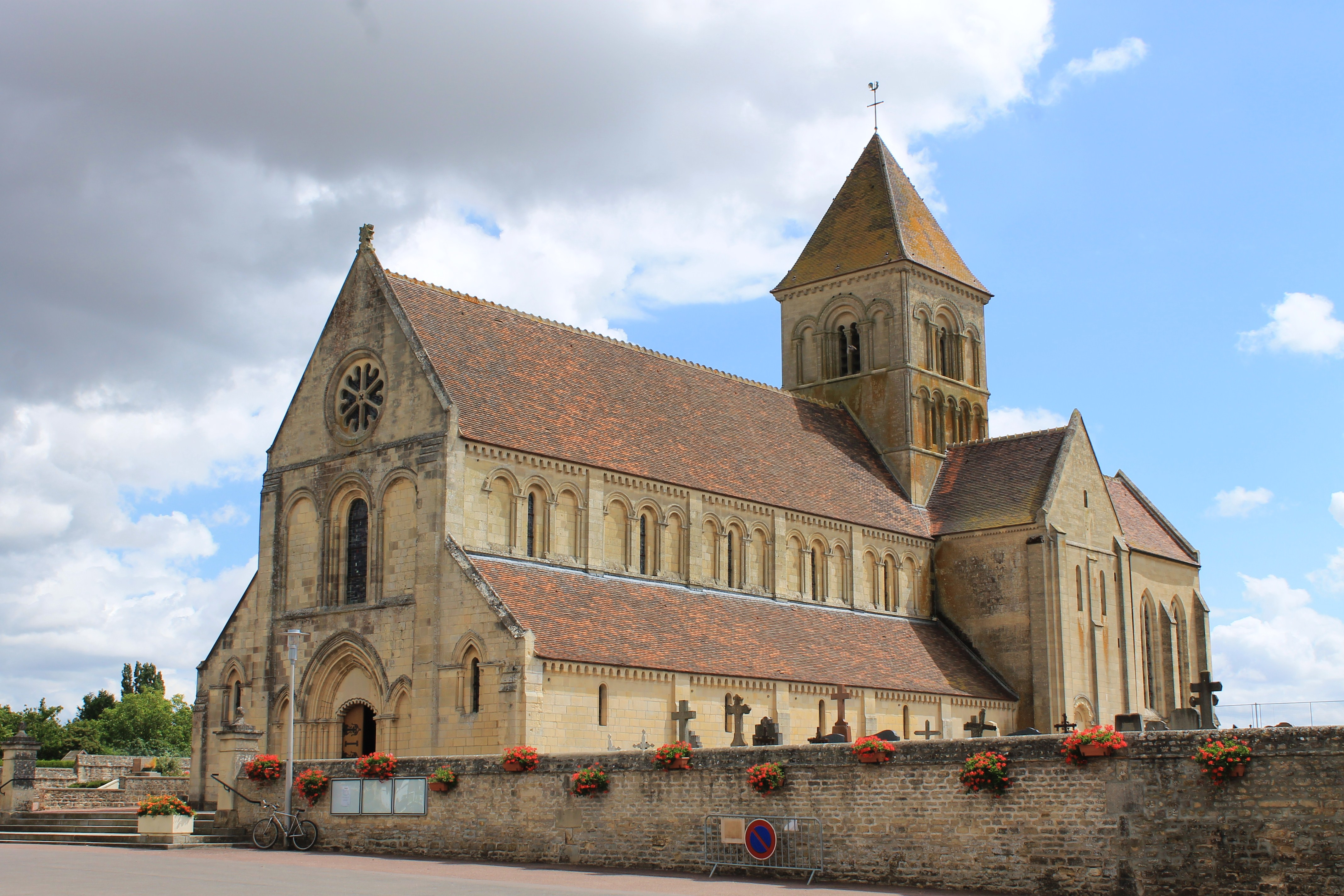 Église Saint-Vigor de Cheux (Calvados)